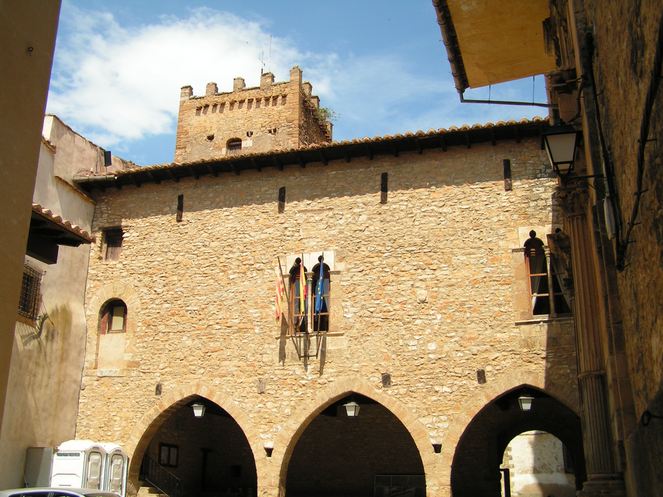 Iglesuela del Cid: Ajuntament